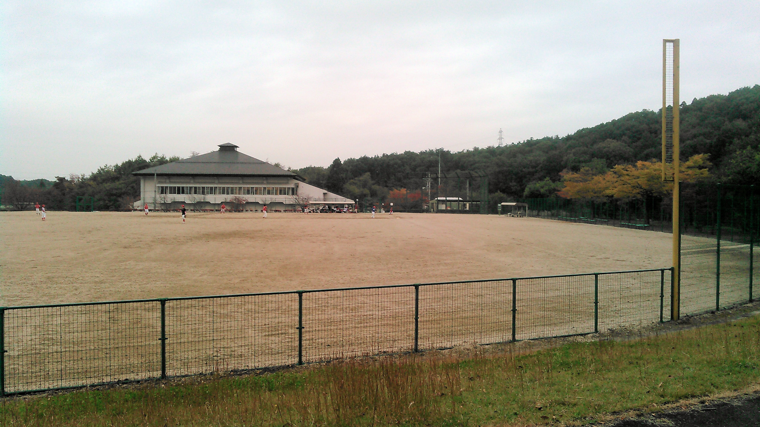 郡山市ふるさとの森スポーツパーク 野球場と体育館